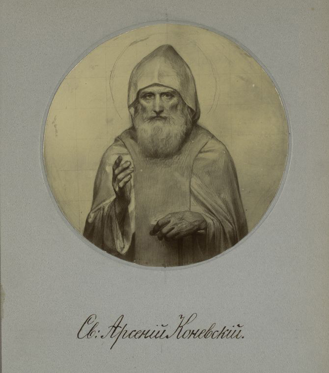 Преподобный Арсе́ний Коне́вский, Новгородский чудотворец